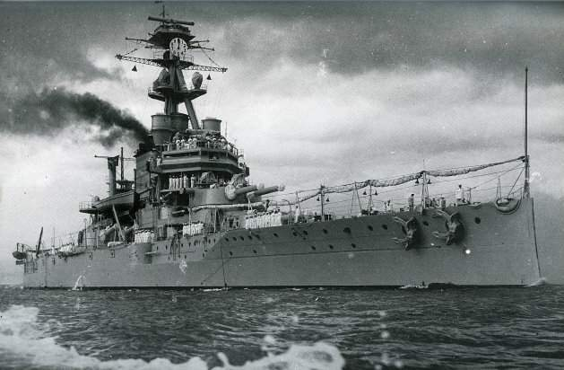 Encouraçado de Esquadra Minas Geraes Marinha do Brasil - Naval ship of Brazil.